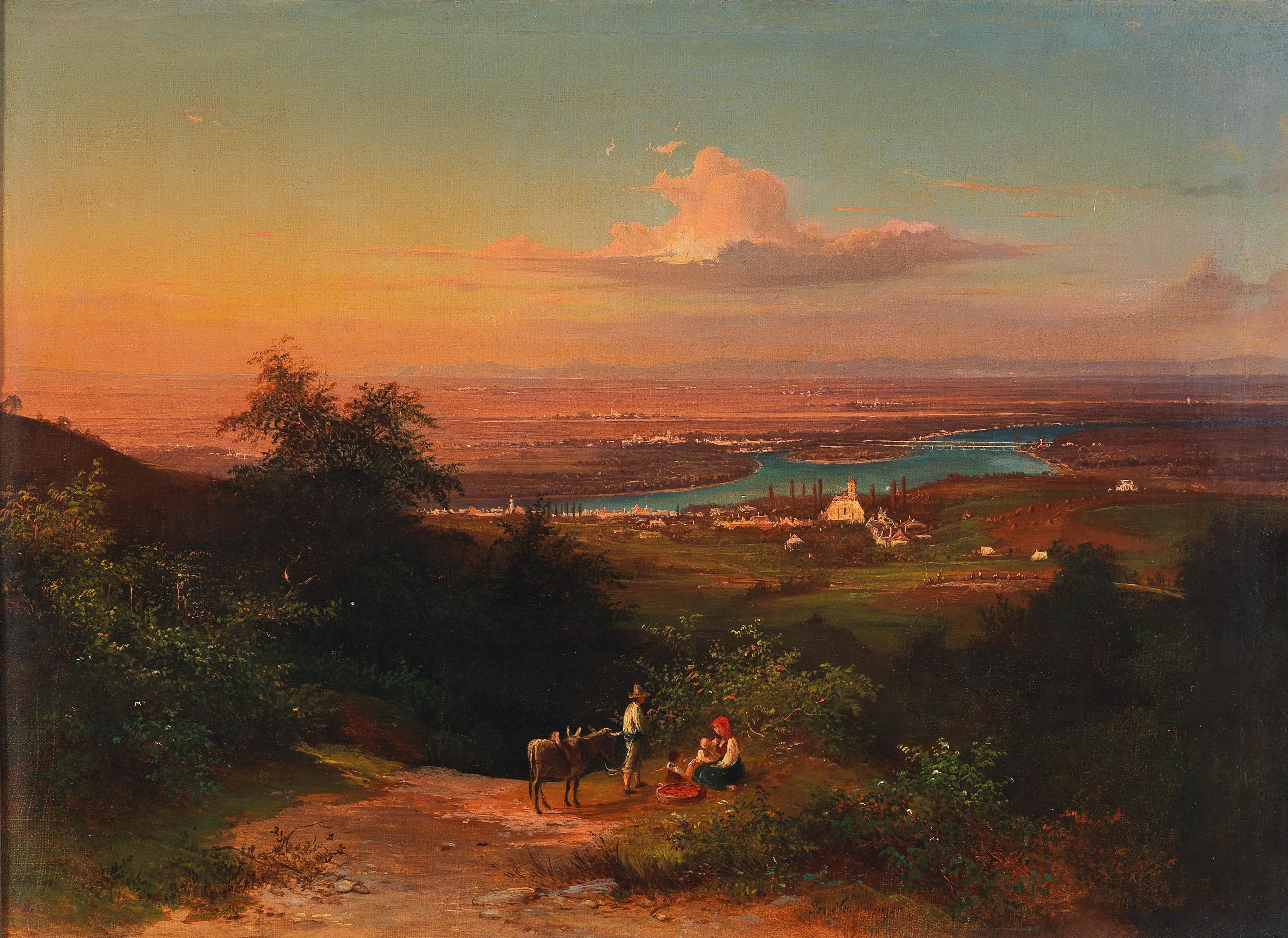 Blick über Nussdorf auf die noch unregulierte Donau, signiert Jos. Schweminger, Öl auf Leinwand, 36,5 x 51,5 cm